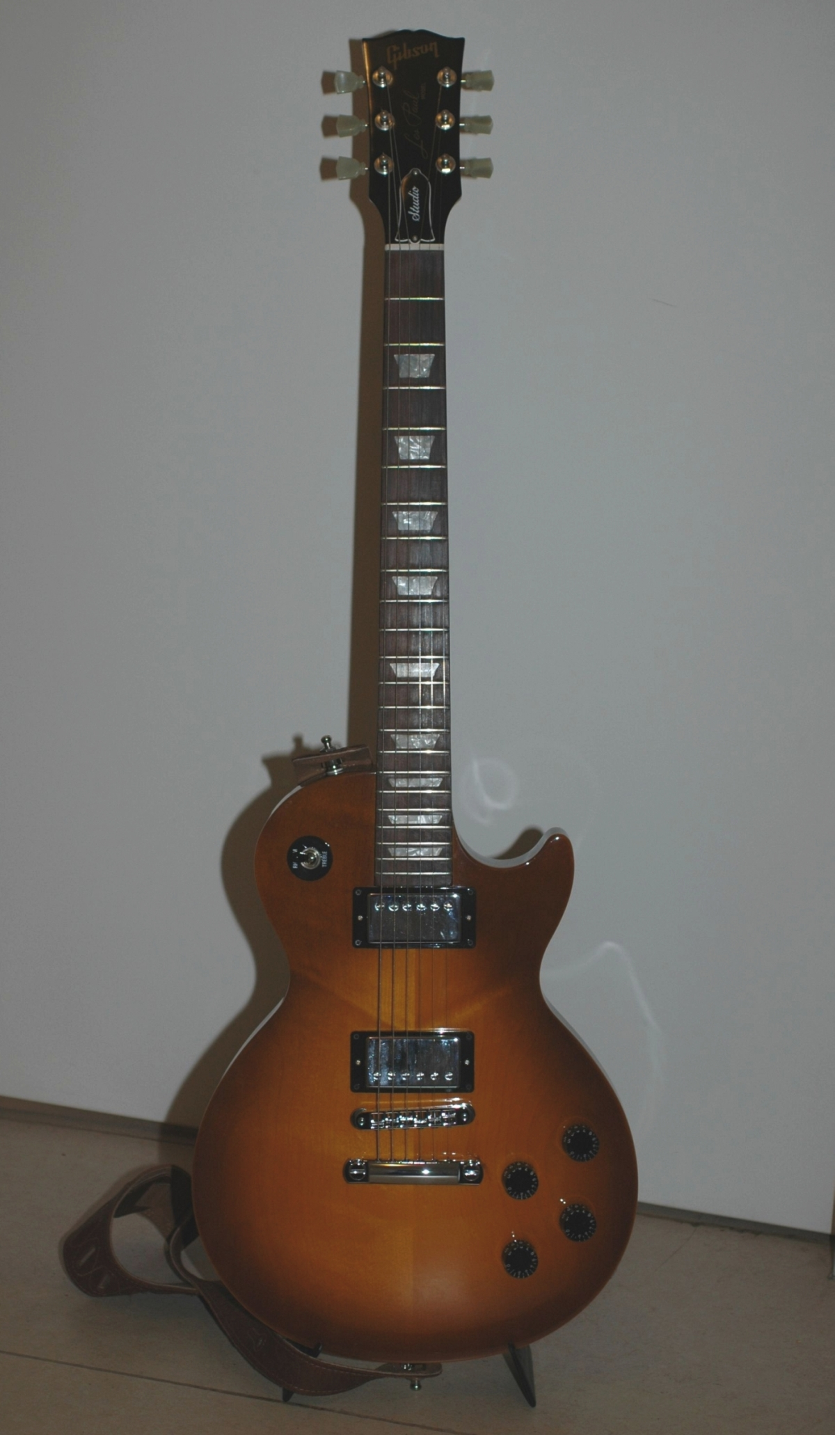 Fonte Gibson Les Paul Studio, fotografia própria por Joachim Hensel-Losch